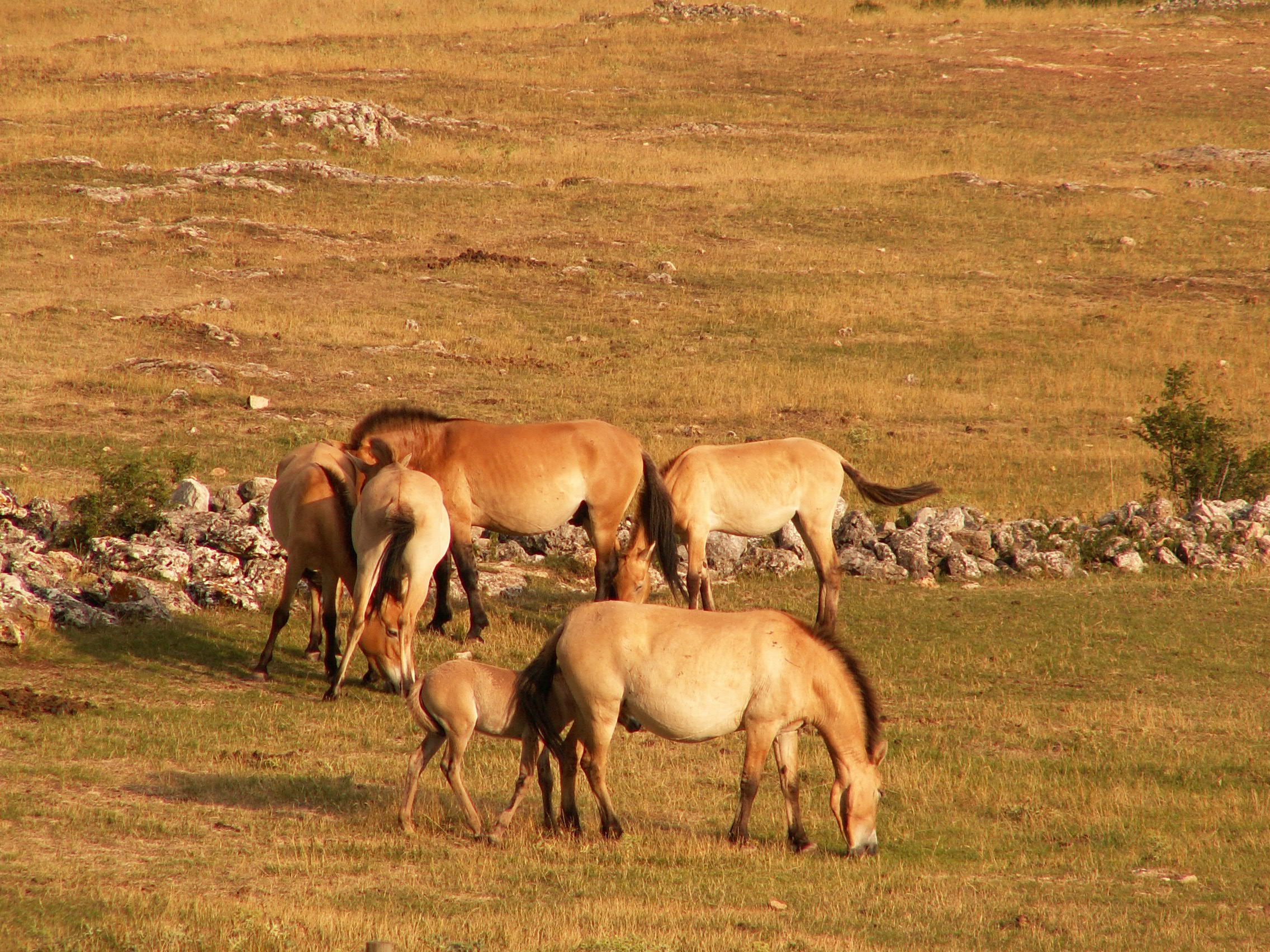 Przewalski's Horse (Equus ferus przewalskii or Equus caballus przewalskii).